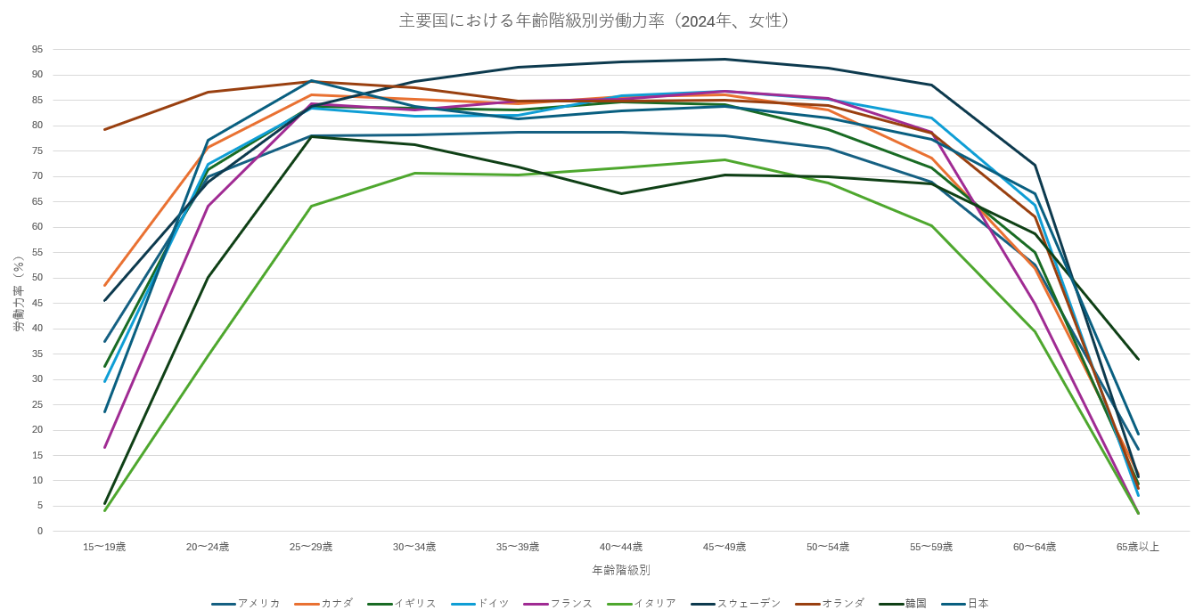 主要国の年齢階級別労働力率（2018年女性）